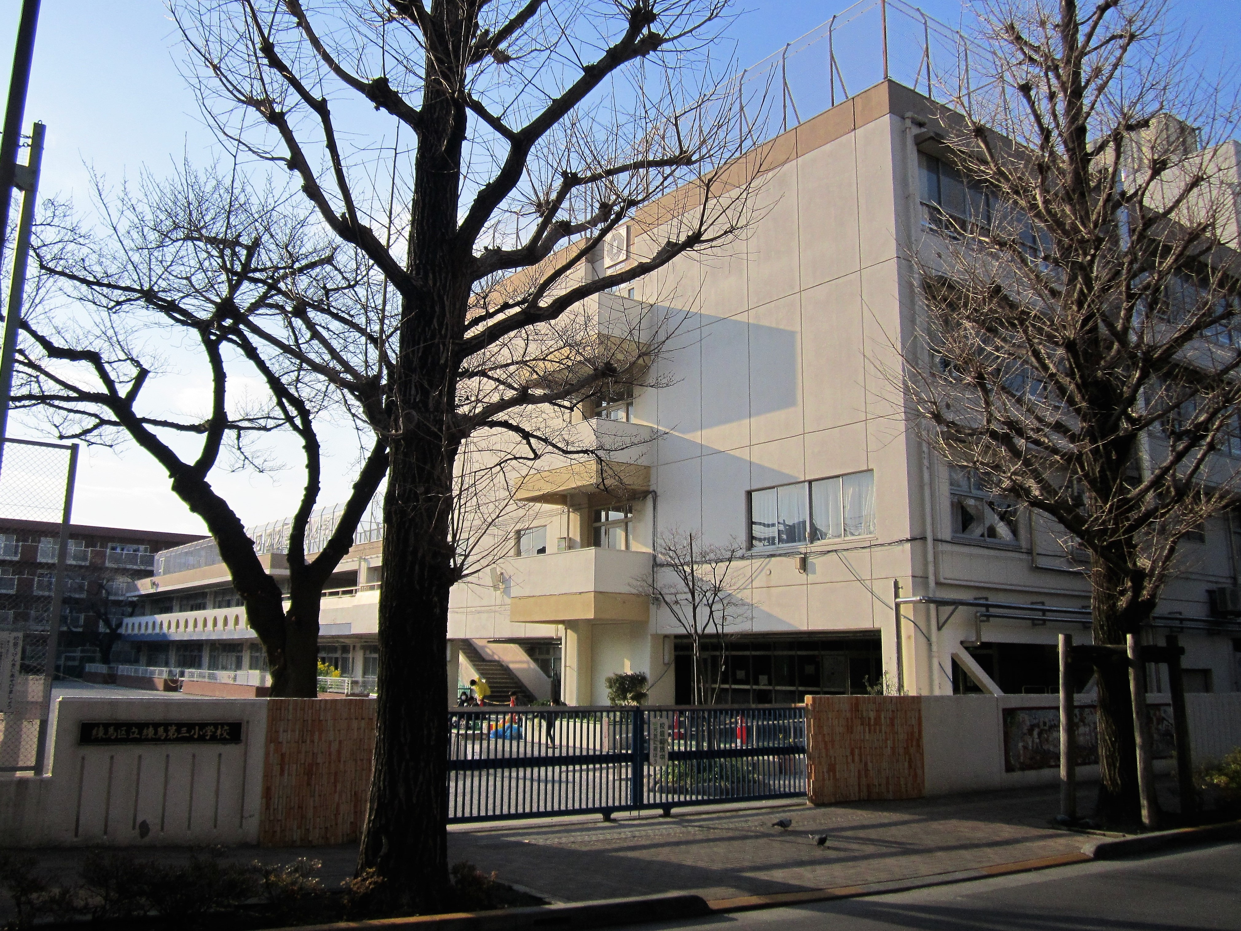 練馬区立練馬第三小学校 Canon PowerShot A2200